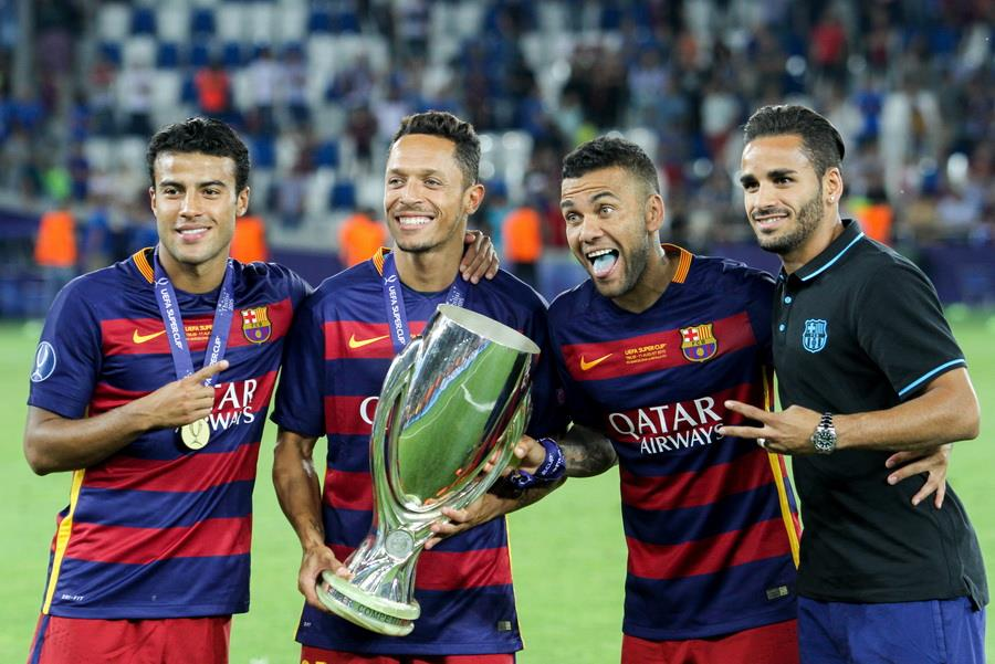 Нагородження переможців матчу за Суперкубок УЄФА 2015 року у Тбілісі. Грузія